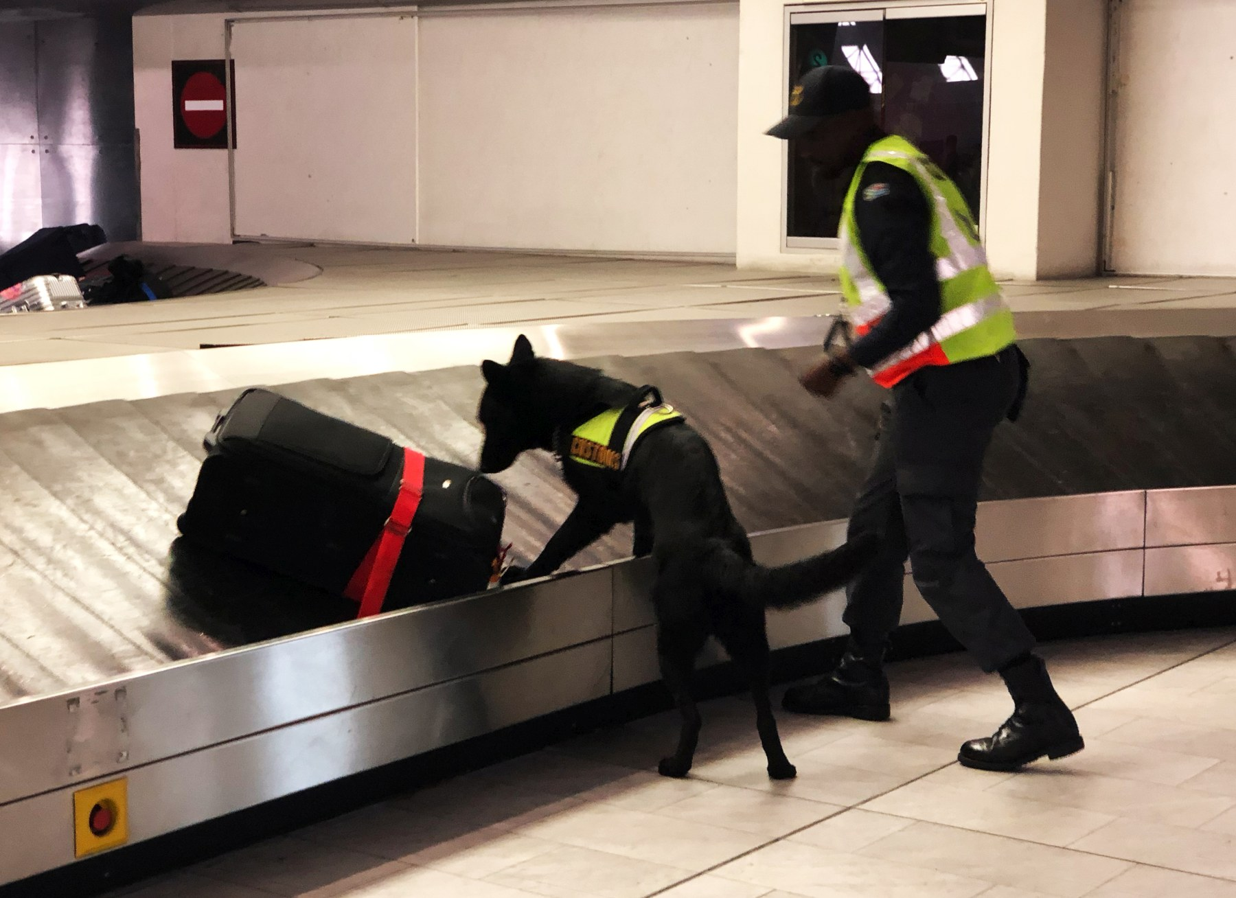 Polizeihund Flughafen sucht Drogen